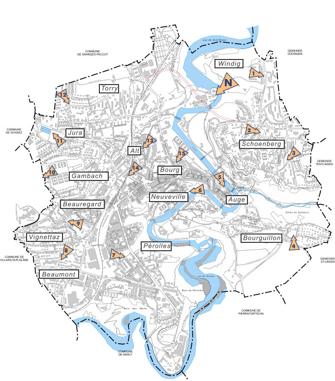 Plan des quartiers de la ville de Fribourg